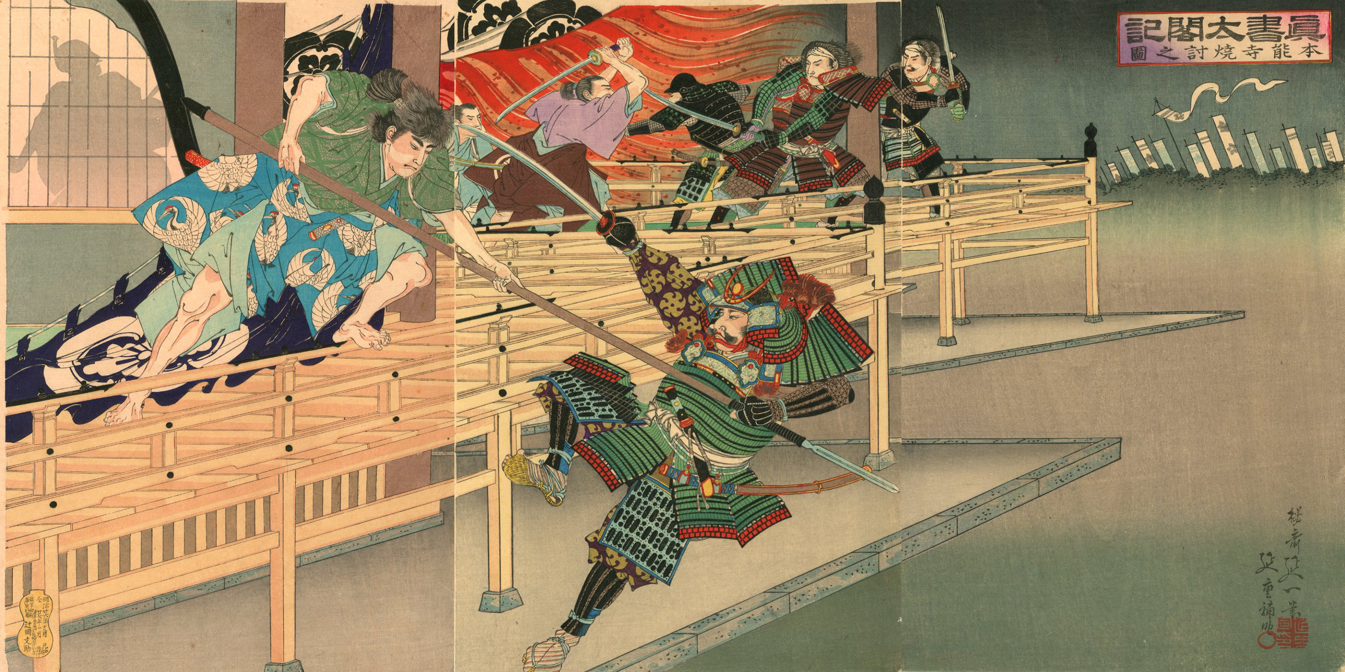 『真書太閤記 本能寺焼討之図』、大判錦絵三枚続、明治26年(1893)